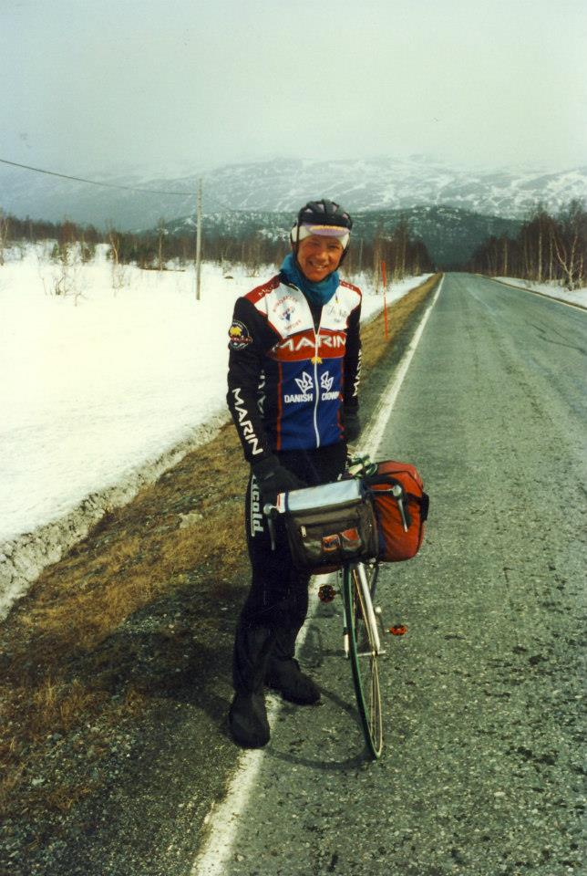 Lars Nielsen cykler til Nordkap og retur 1